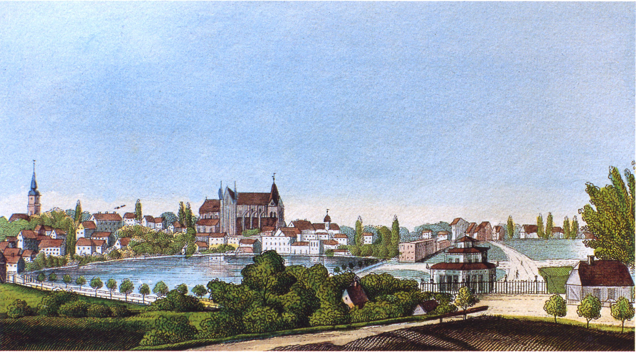 Schwerin (links: Schelfkirche, Mitte: Schweriner Dom, Gewässer: Pfaffenteich)